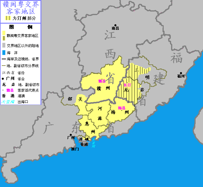 汀州在赣闽粤交界客家地区的方位